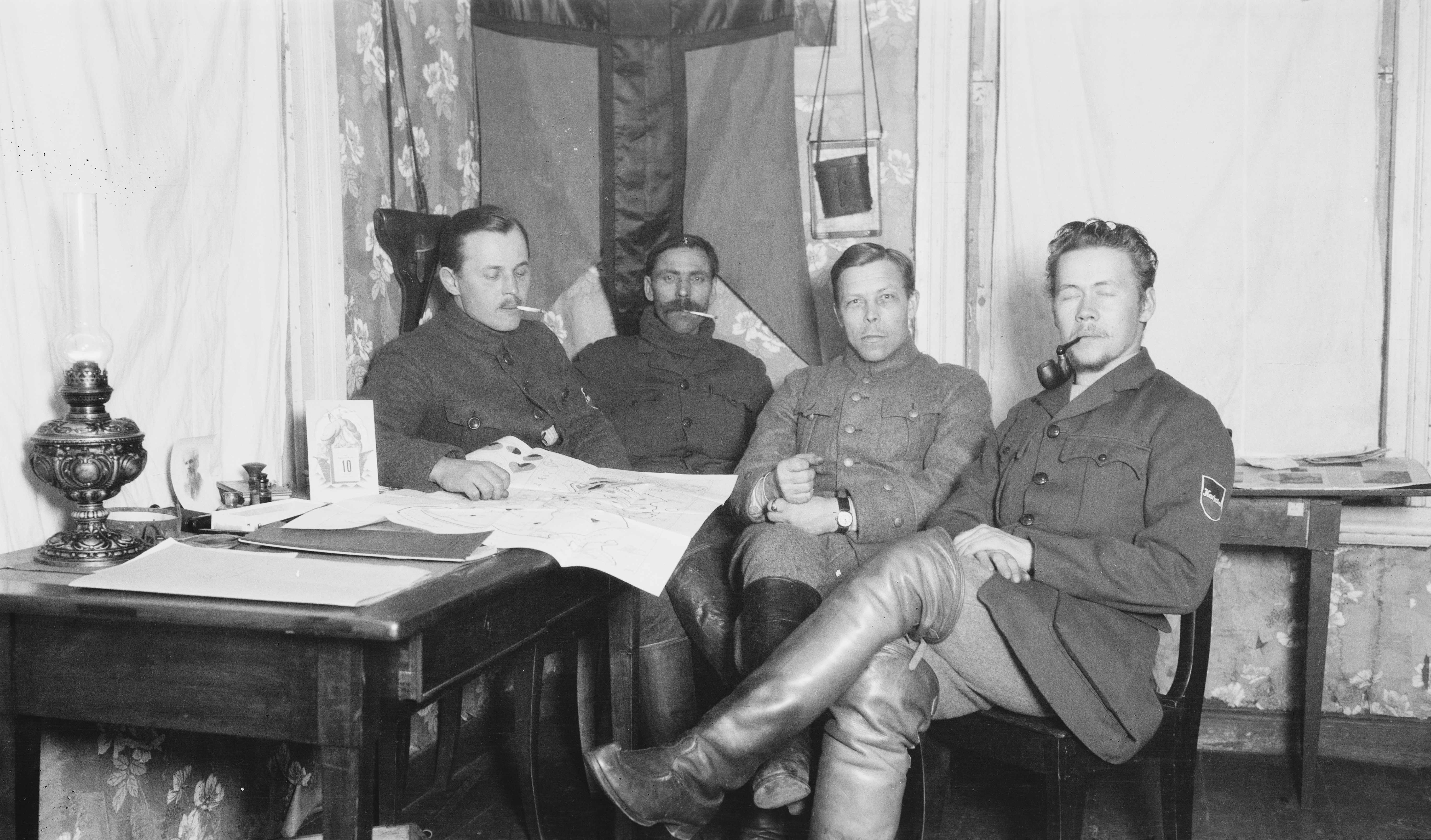 Karjalan metsäsissipataljoonan Ilmarinen, Järvinen ja Malkamäki vuonna 1921-1922. Kuvan ottaja Sakari Pälsi ja paikkana Kiimasjärvi, Aunus, Itä-Karjala.